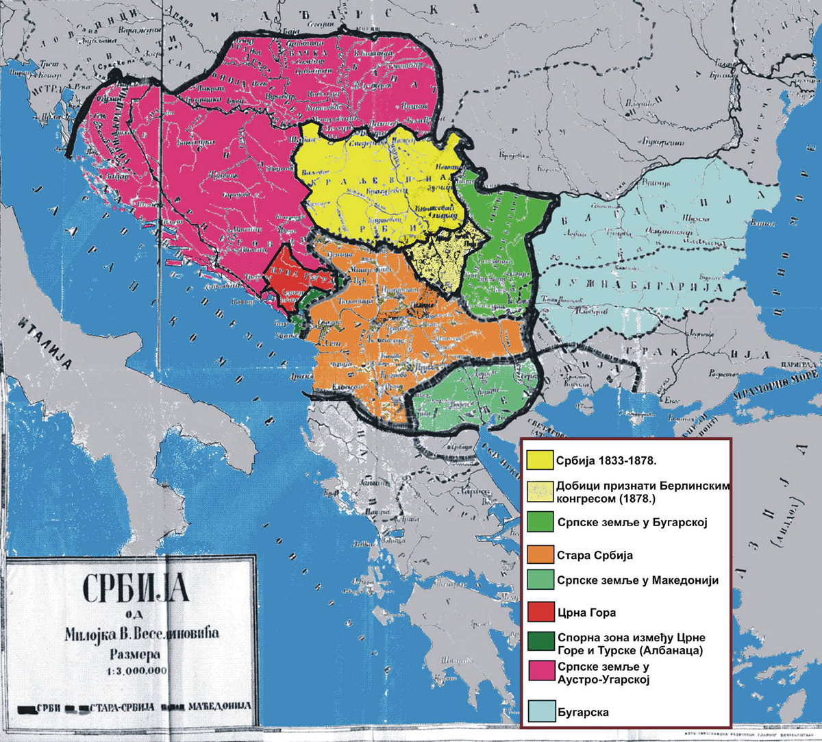 Назив мапе: Србија Карта српског етничког простора после Берлинског конгреса (1878)